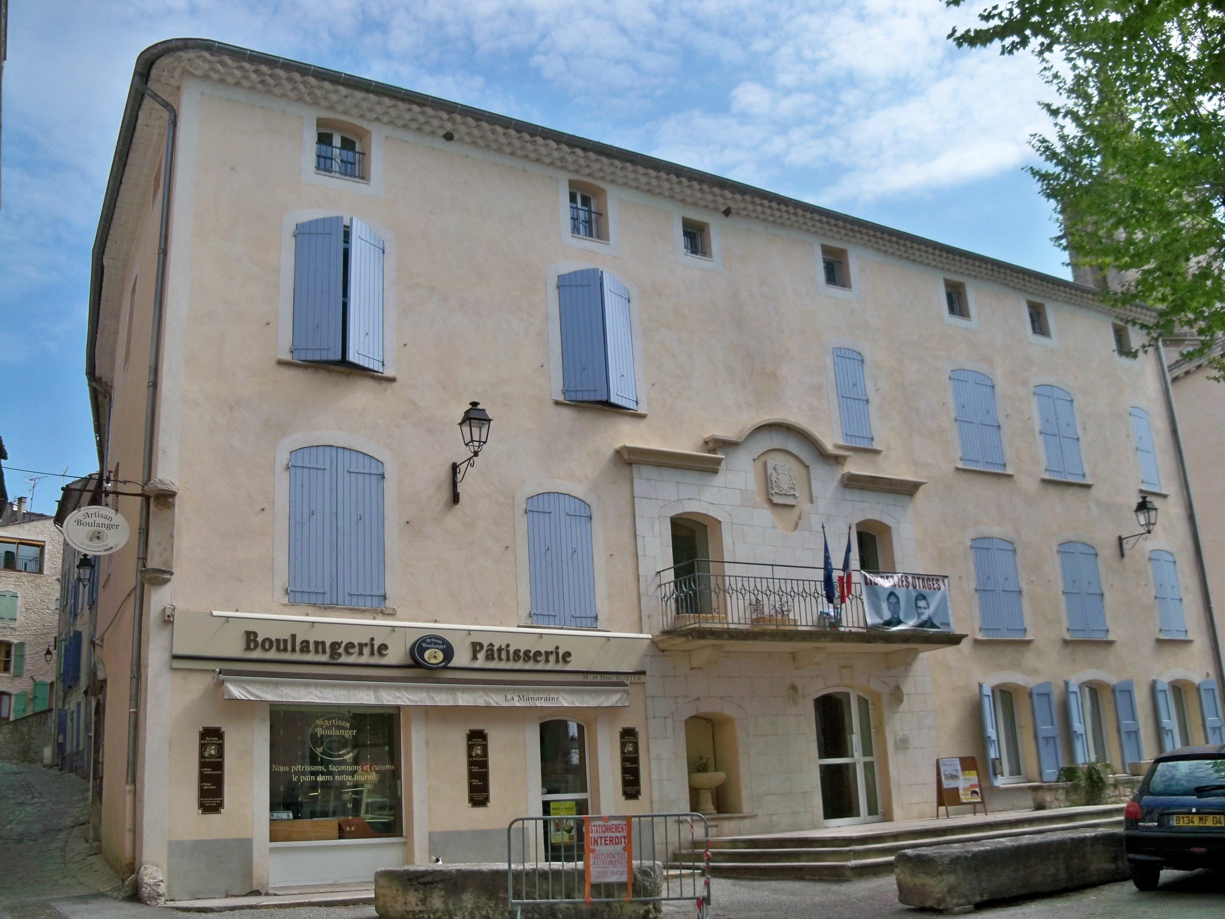 Mairie de Mane (04)